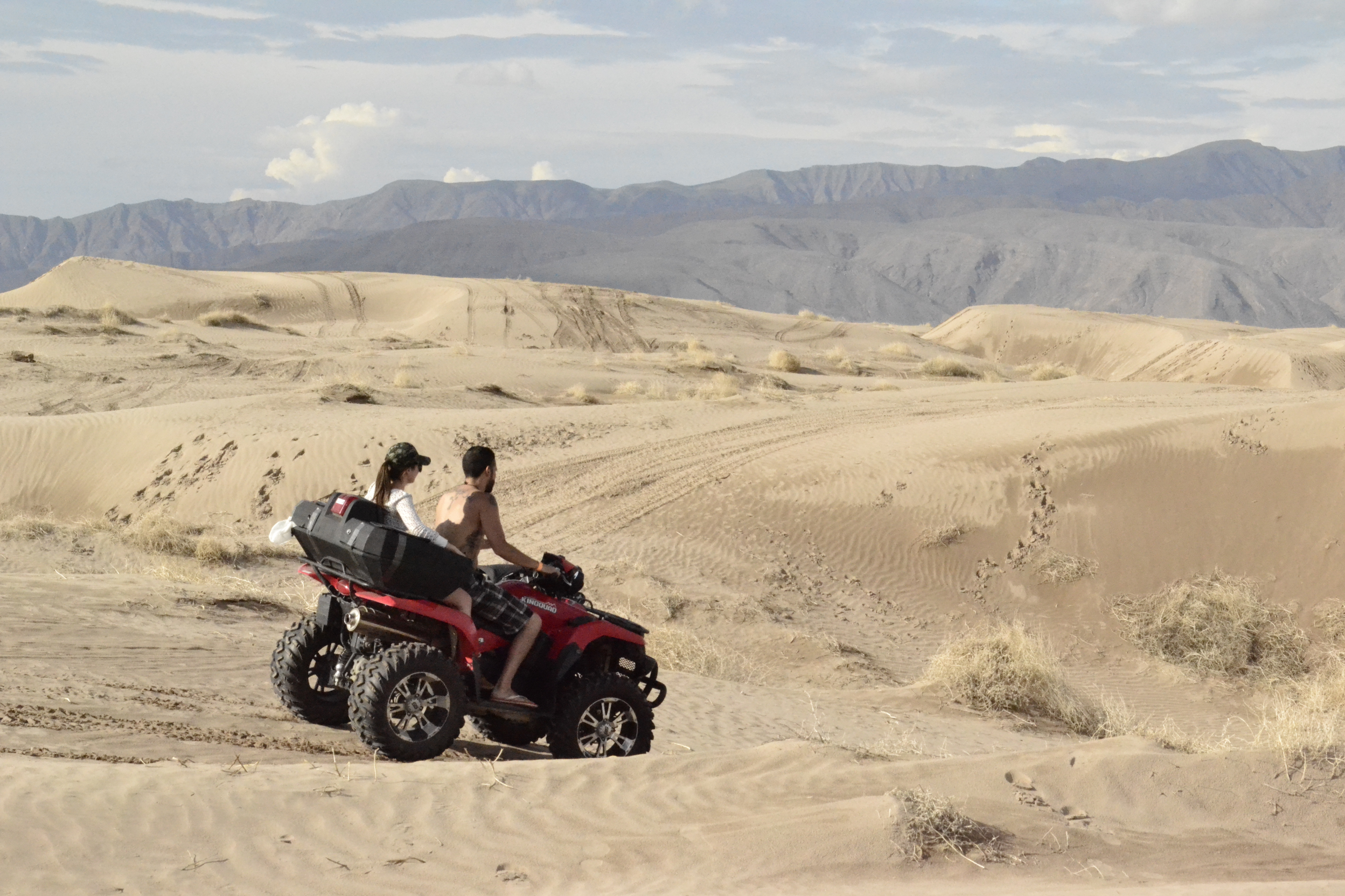 Paseo en cuatrimoto en las Dunas de Bilbao. Viesca, Coahuila, México.